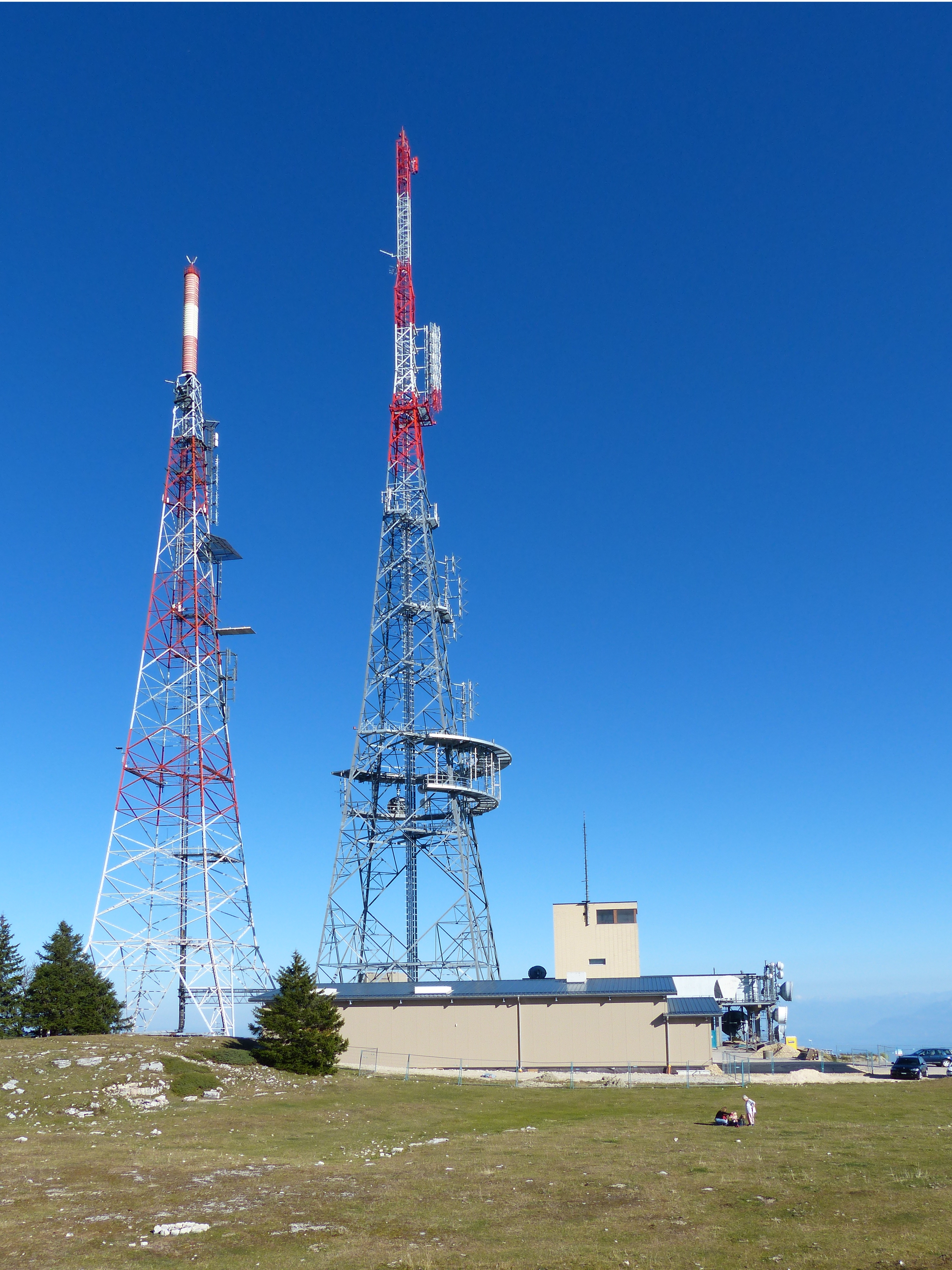 Deux antennes à La Barillette, canton de Vaud, Suisse.